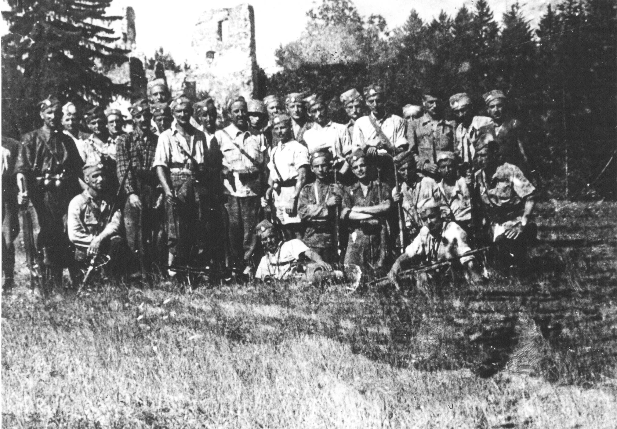 Slovenski četniki na Dolenjskem.